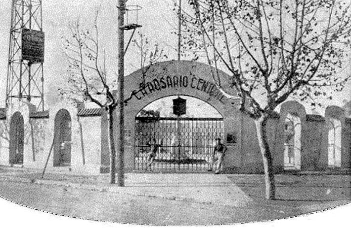 Entrada a la tribuna oficial en la década del '30. Esquina de Génova y Cordiviola.